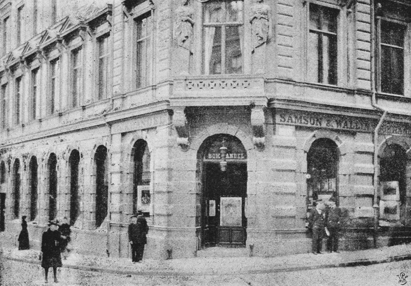 Samson & Wallin Bokhandel, Drottninggatan 7 (sedermera Nordiska Bokhandeln)